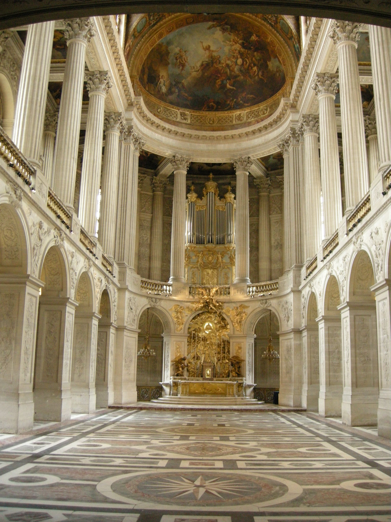 Versaille, cappella interno